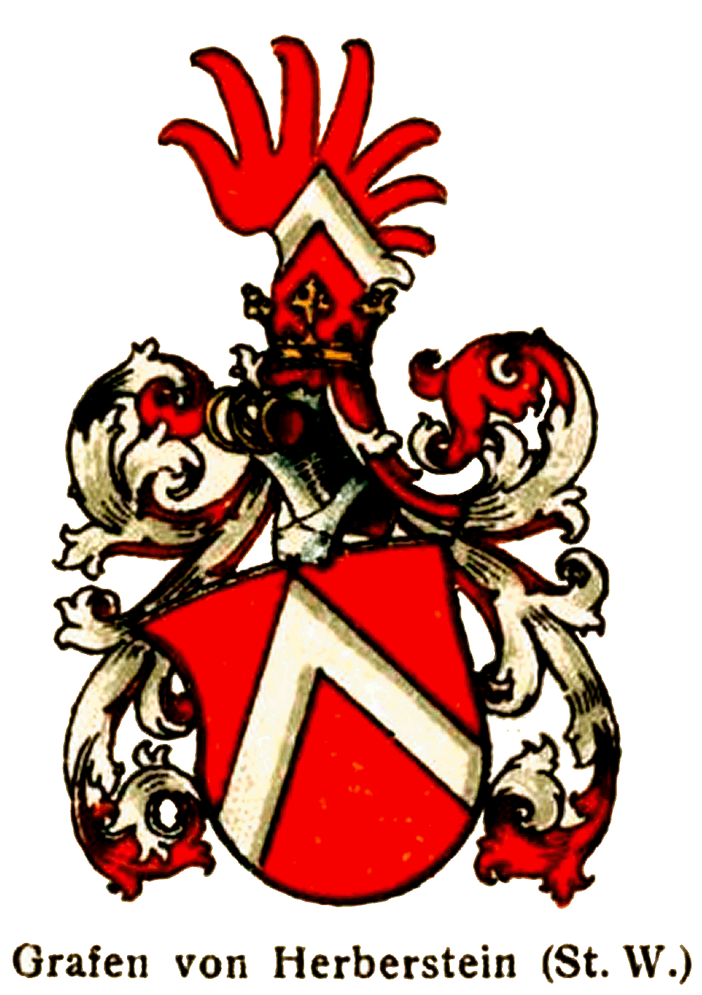 Stammwappen derer von Herberstein